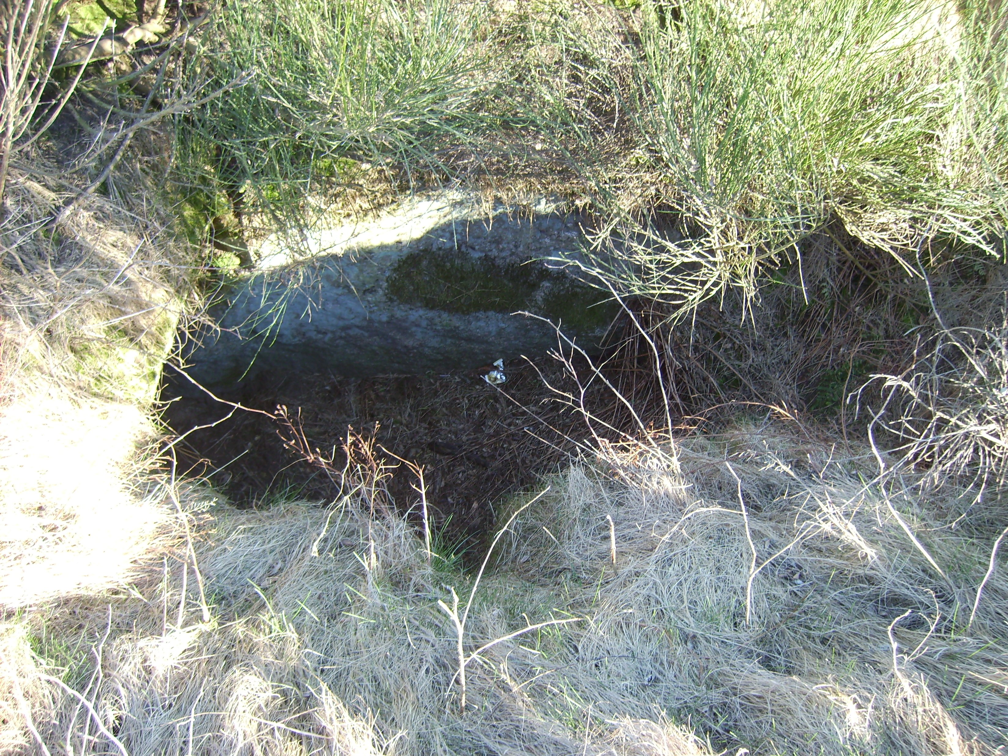 A dolmen (Stenstuen ved Gærum) 68 x 17 x 3 meter, with a burial chamber, has the number SB 102, in the parish Gærum in Frederikshavn municipality, Denmark. SB 102 (Stednavne: Vester Annexpræstegaard), Gærum sogn, Frederikshavn Kommune. Anlæg SB 102 (Stenstuen ved Gærum), langdysse med et kammer, omgivet af 57 store randsten. Længde 68 m, bredde 17 m & højde 3 m. Source: SB 102